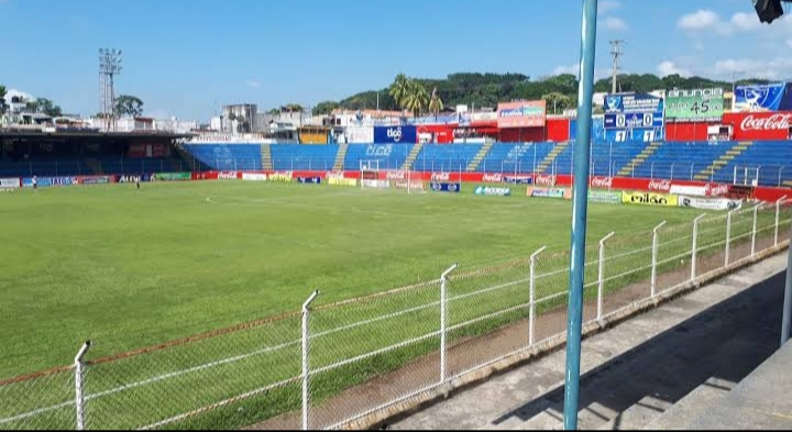 Recinto deportivo de fútbol en Mazatenango, Suchitepéquez, Guatemala. Con capacidad de 10 000 espectadores.